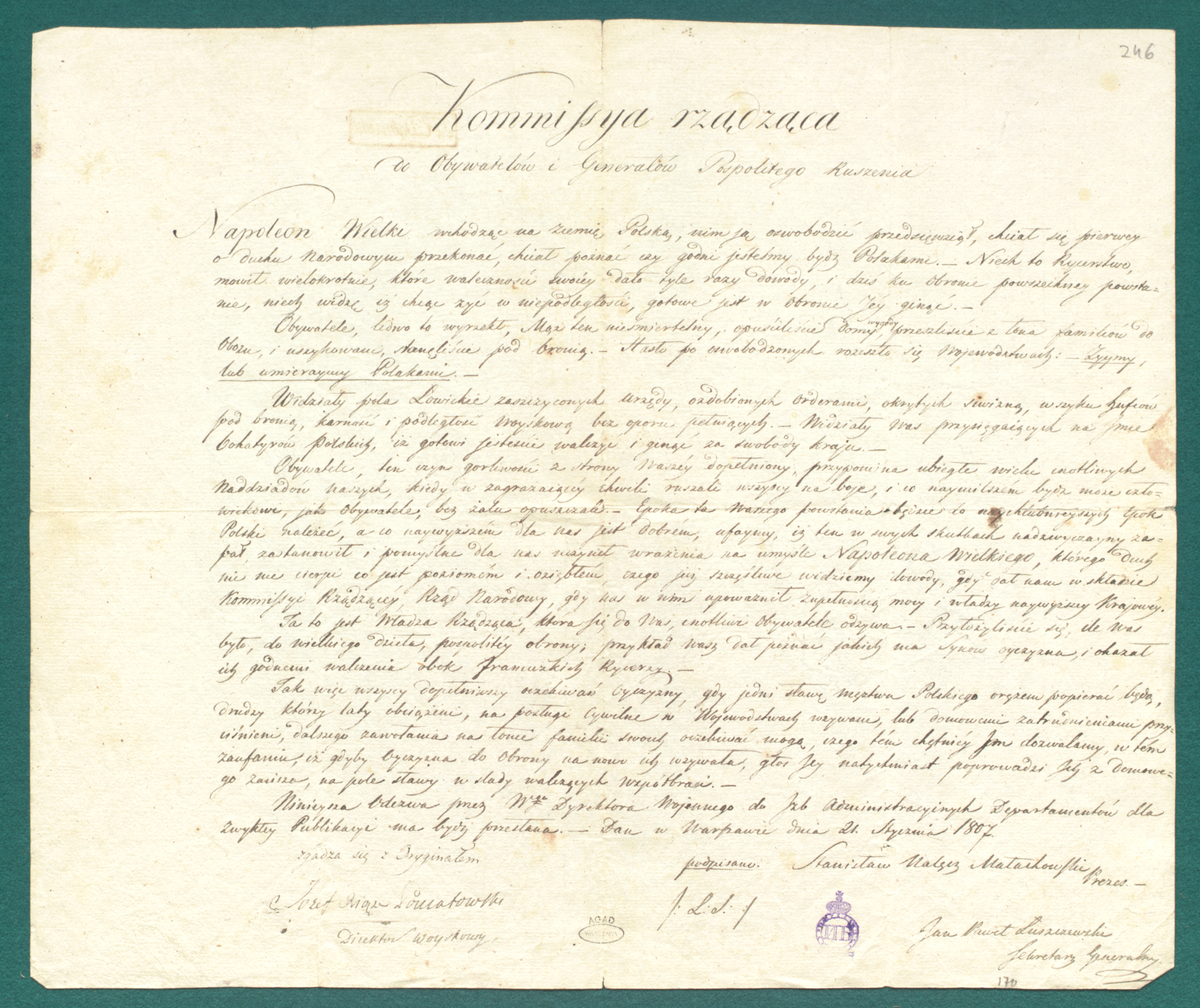 Odezwa